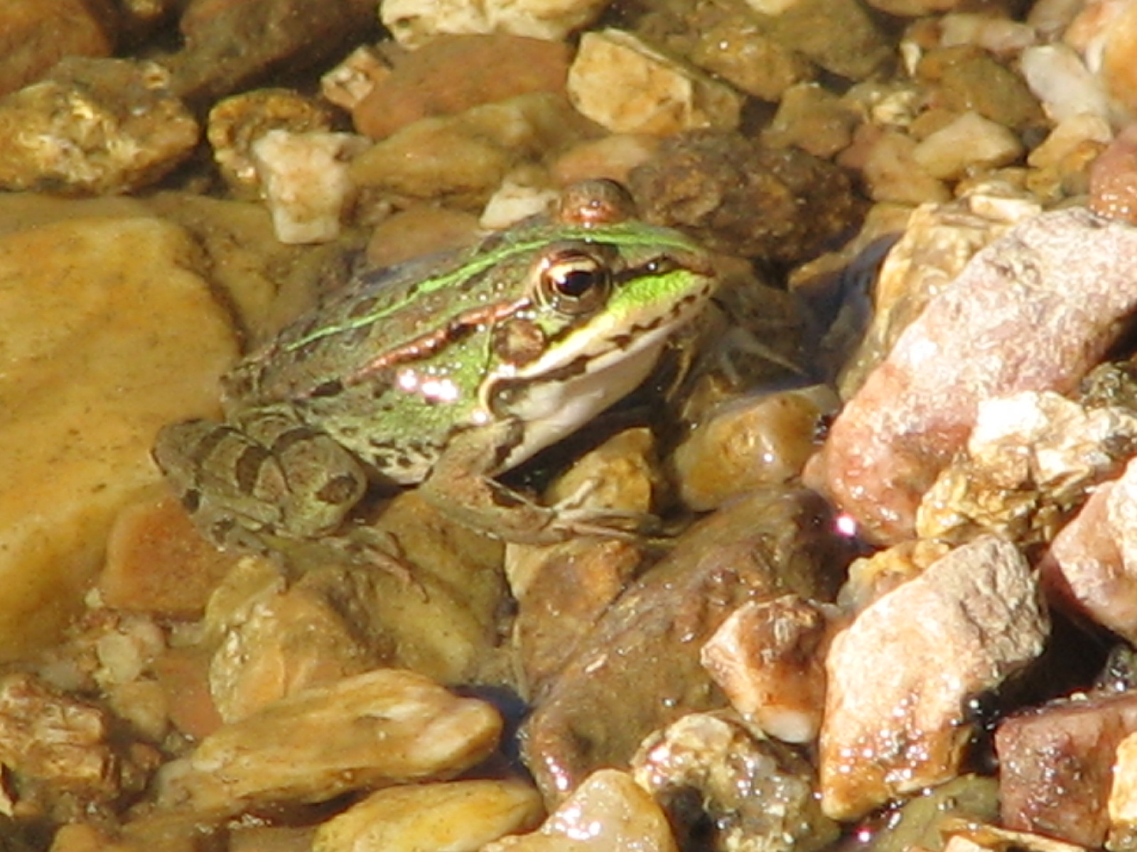 Rana perezi. Taken at Albarragena river, nothern Alburquerque (Badajoz, Spain).